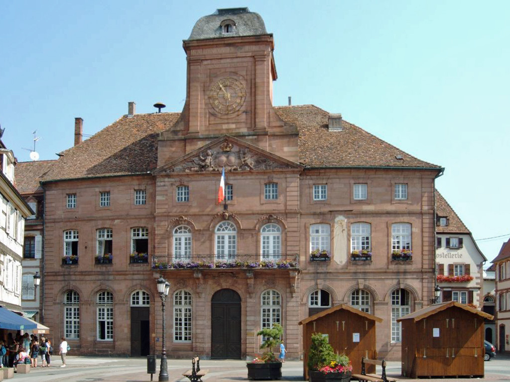 Rathaus in Weißenburg, Frankreich